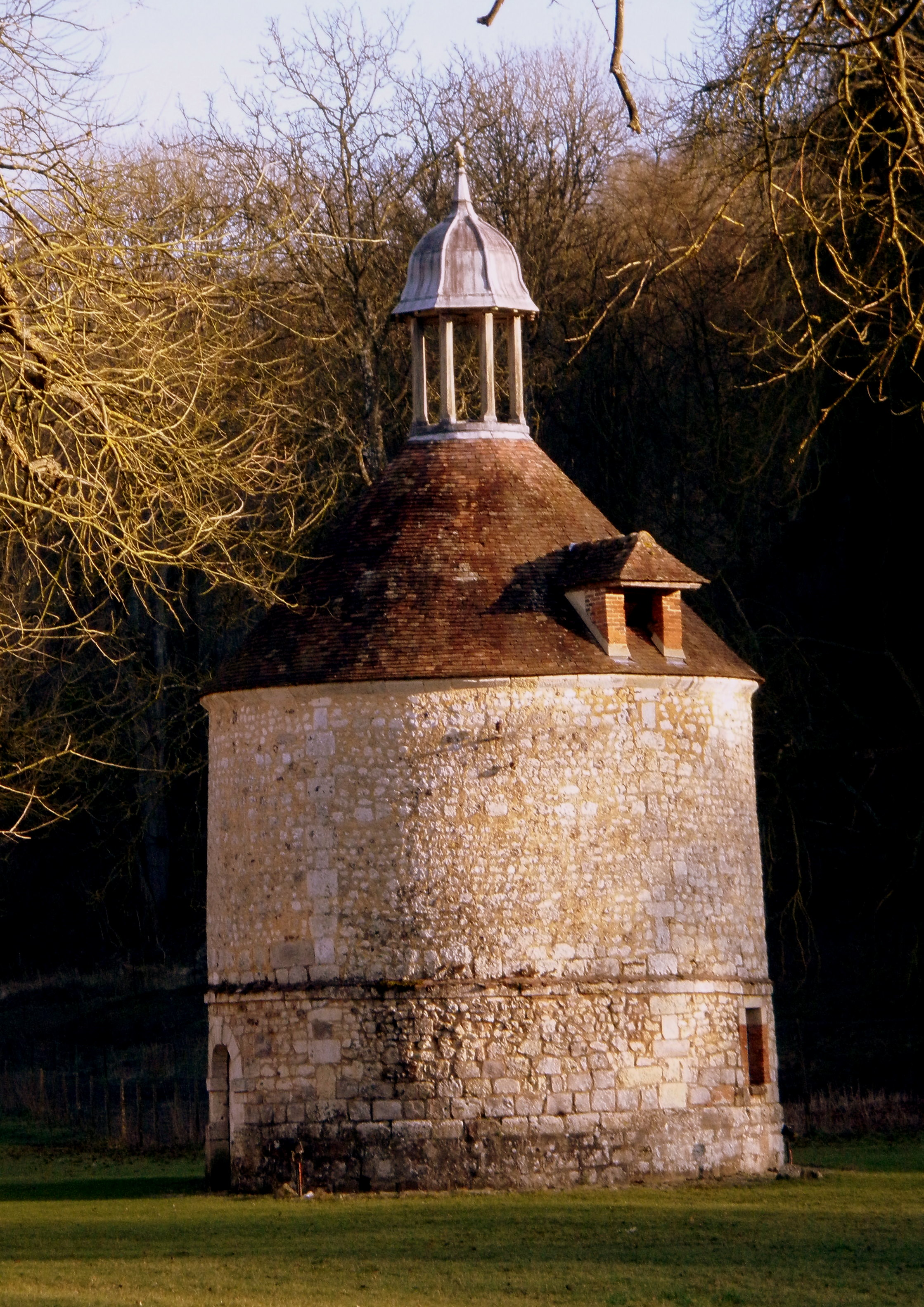 Le colombier (= pigeonnier) de l'abbaye de Mortemer (Normandie).